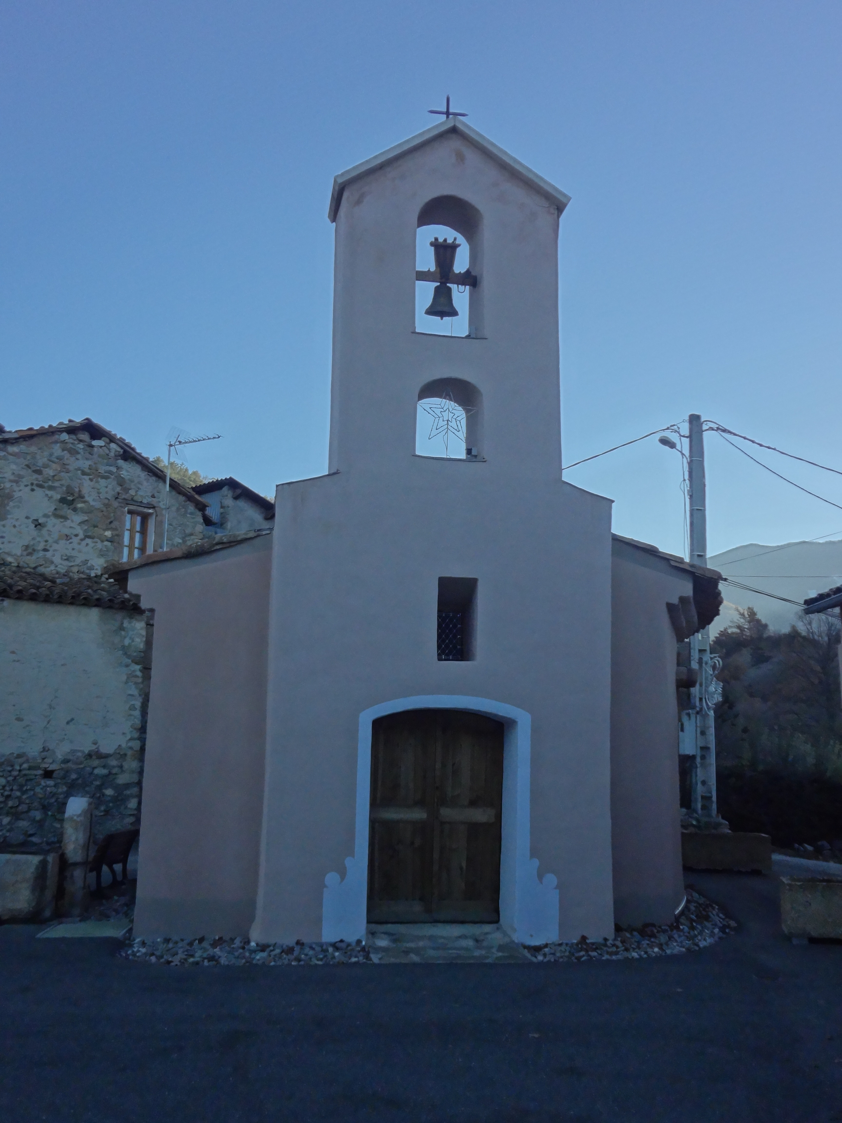 Façade de la chapelle Notre-Dame de la Visitation du hameau des Roches, à Claret